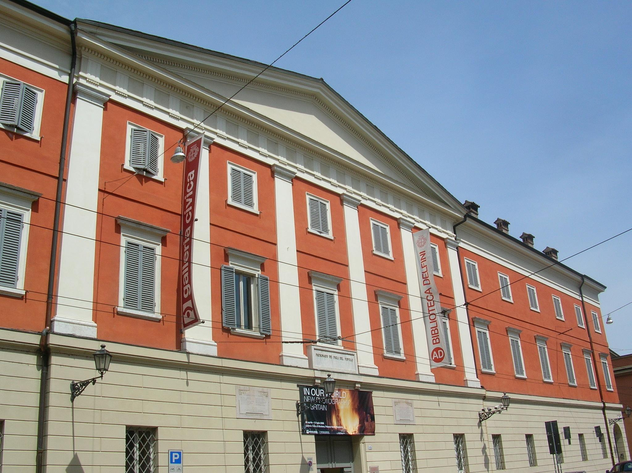 Modena